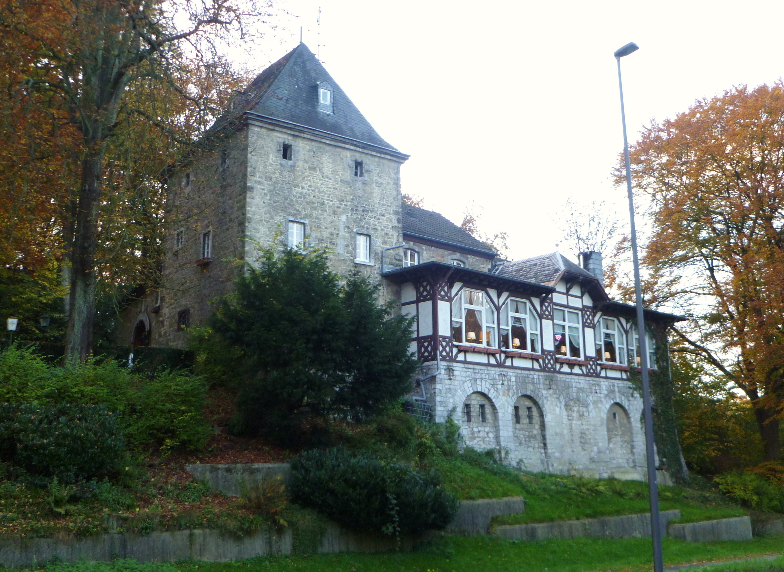 Baudenkmal in Aachen